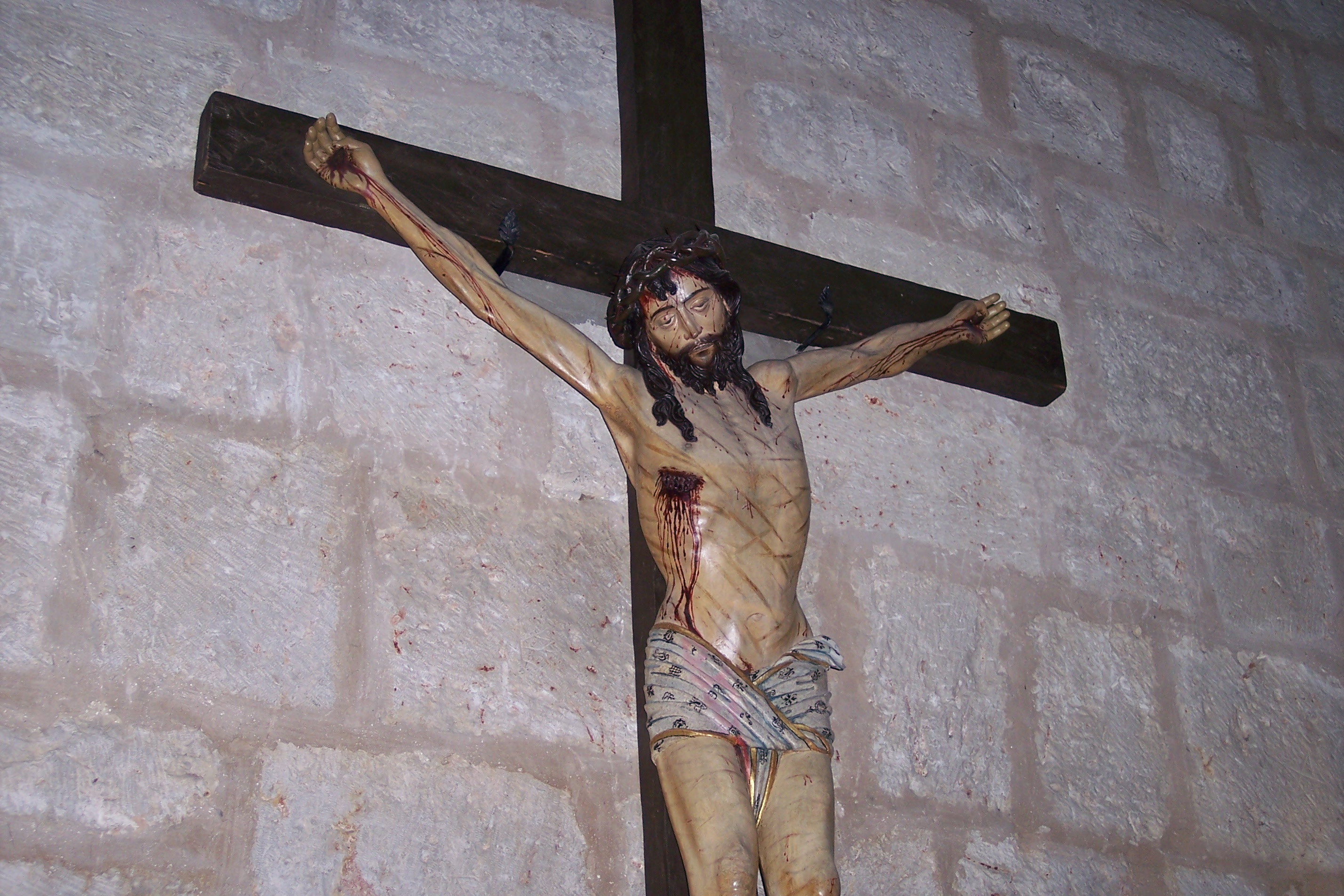 Detalle del Cristo crucificado de la iglesia de San Francisco en Palencia. Obra del escultor gótico Alejo de Vahía. ca. 1500.